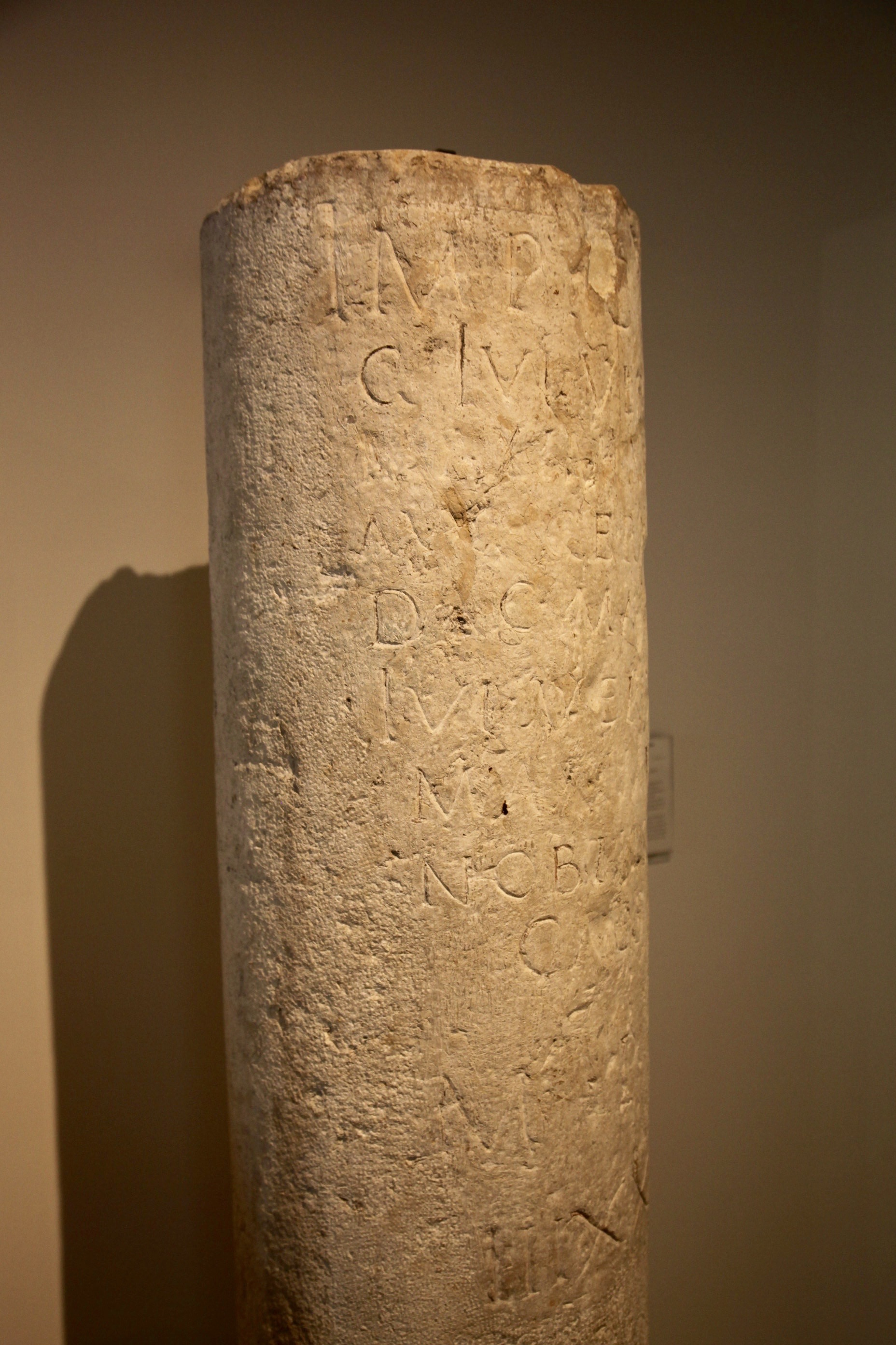 Borne milliaire datée 236 - 238 visible au Musée Archéologique de Valence